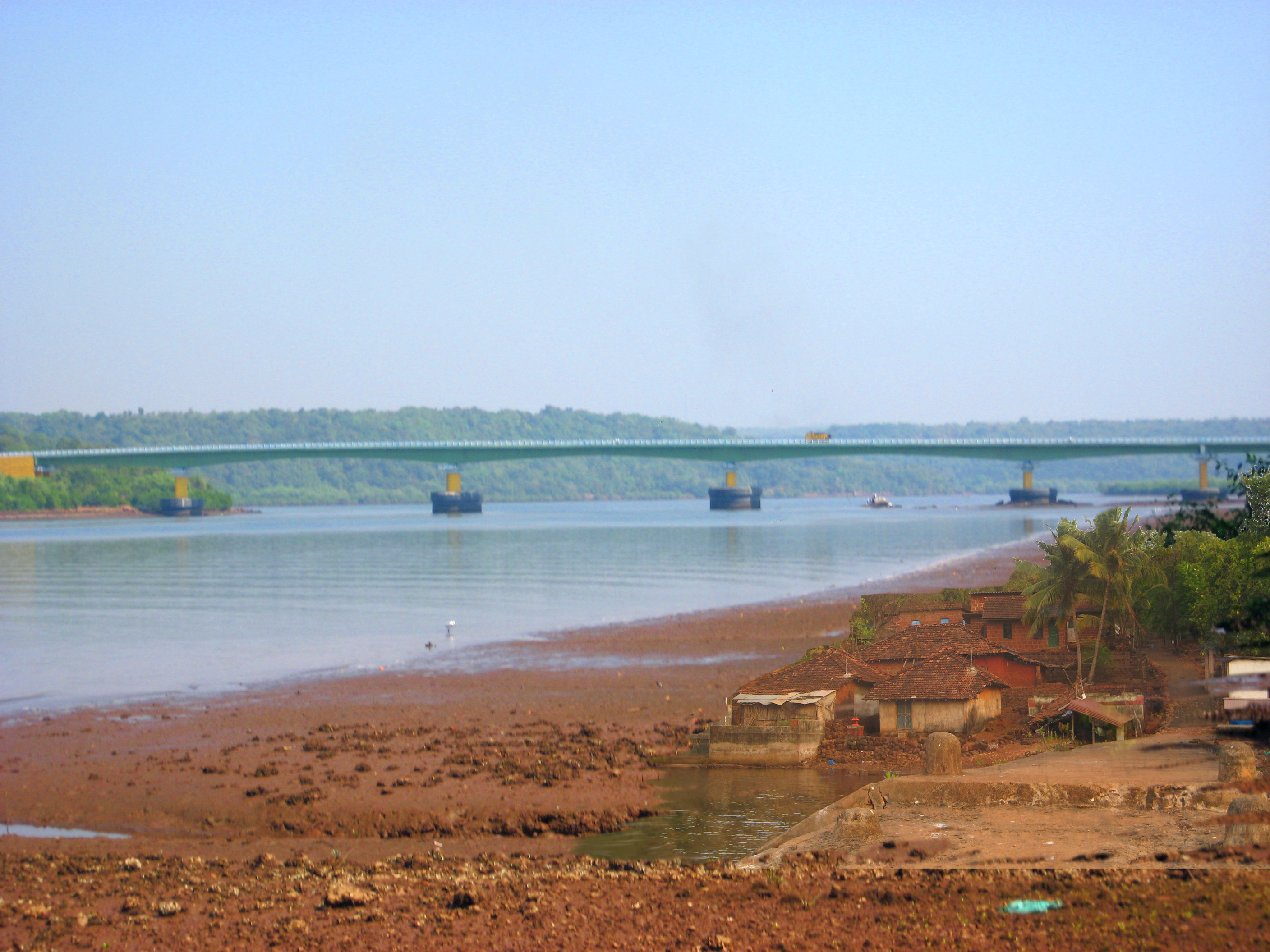 tirlot bridge